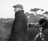 Dernier tournage de Pierre Prévert en 1980.Licence CC-BY-SA Contents 1 Licensing 2 Source 3 Licensing 4 Original upload log Licensing Source Ayant droit